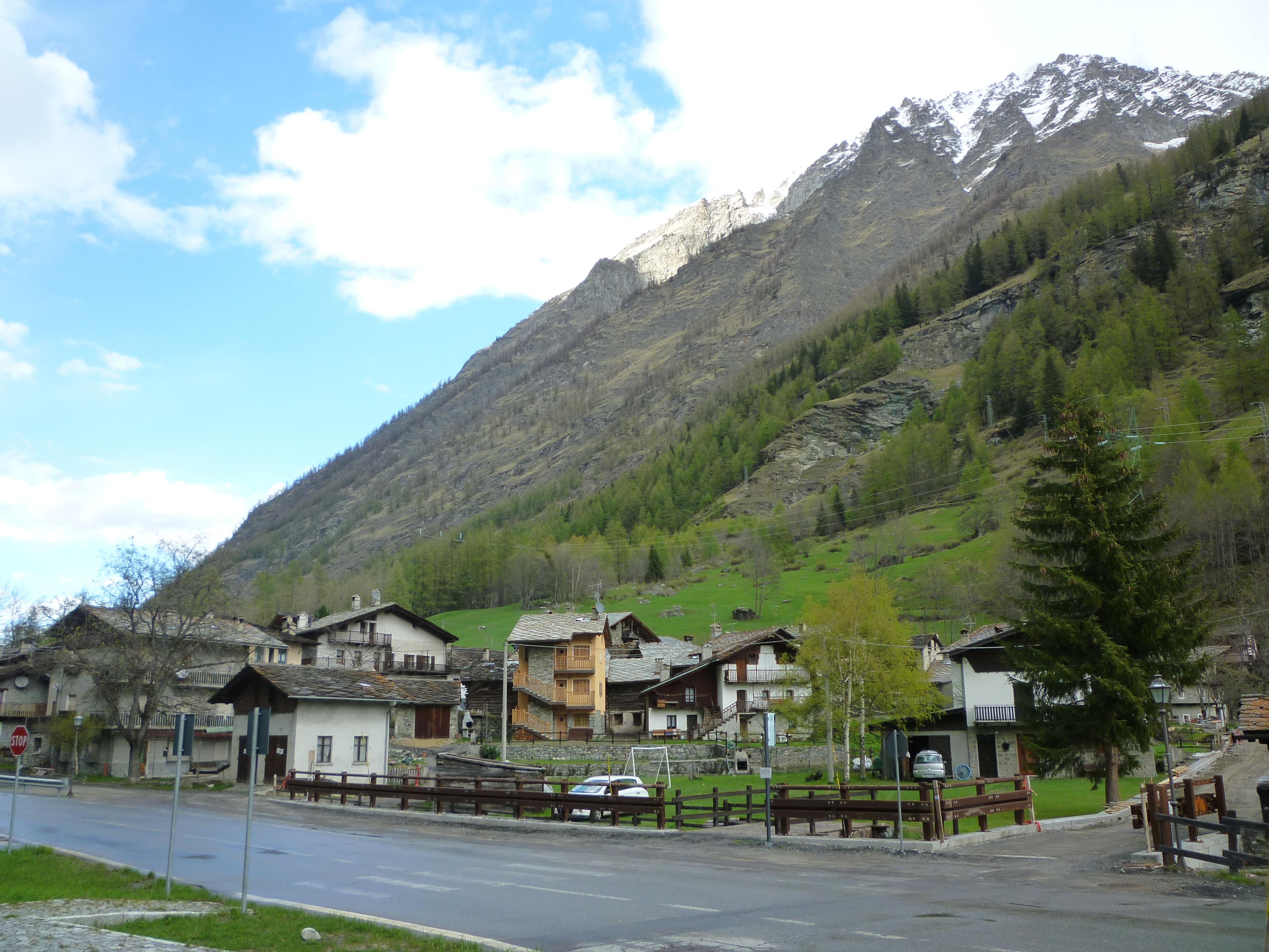 Rovenaud